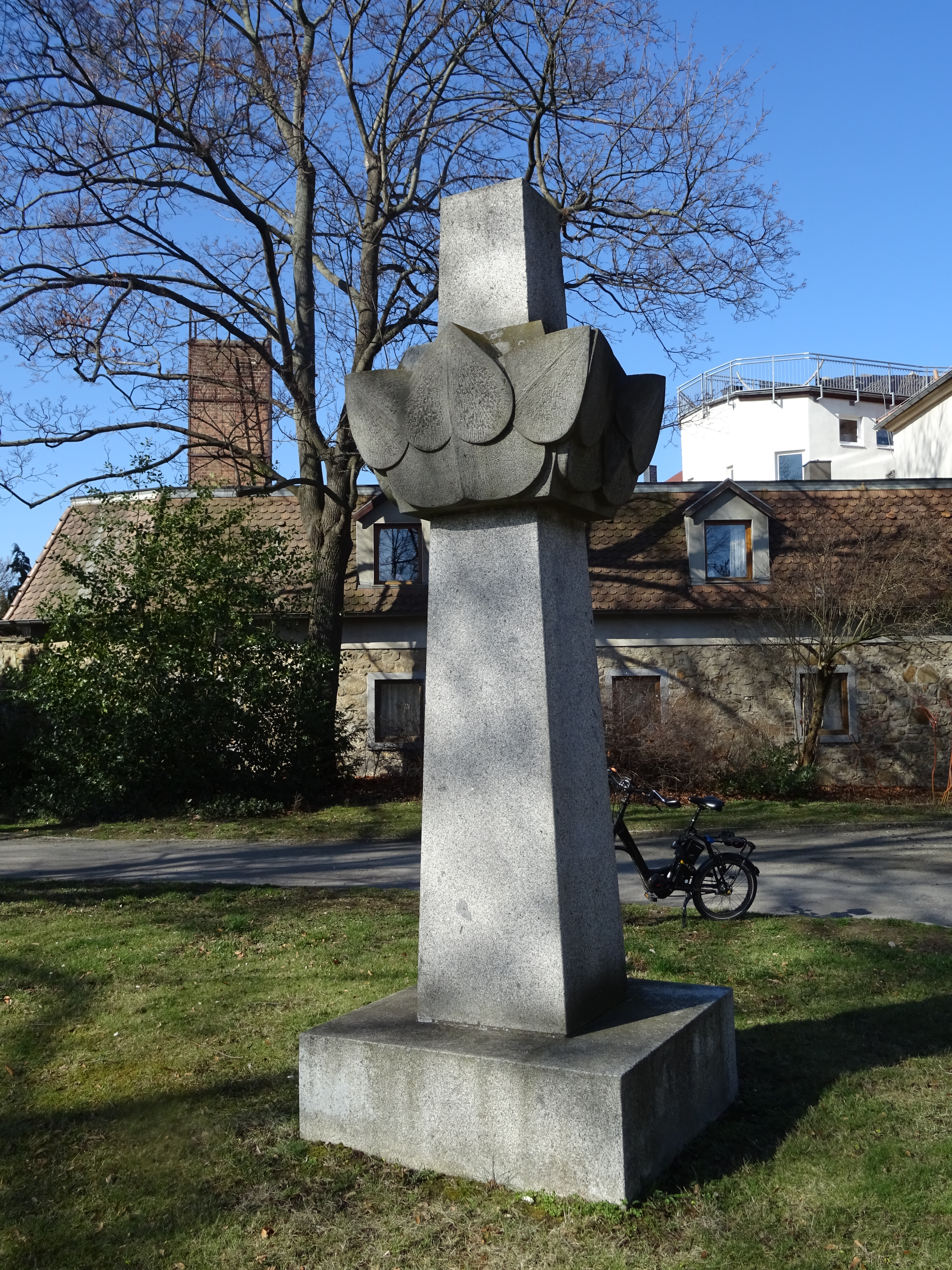 Bautzen: Skulptur "Obelisk mit Lindenblättern" vom Bildhauer Miroslav Klimes, Grüner Ring Wallstraße